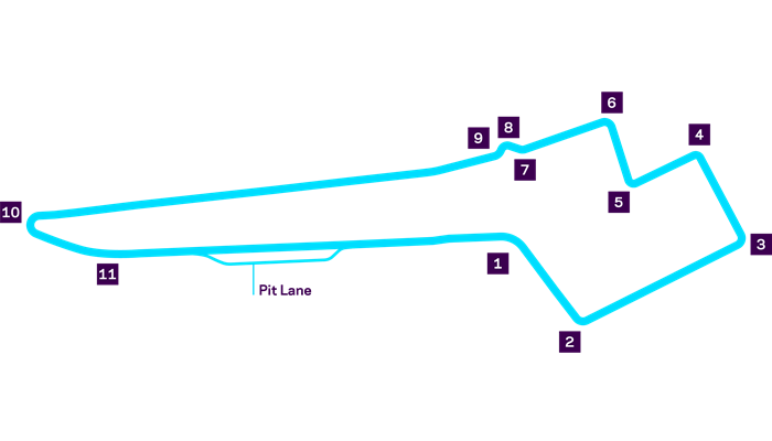 Circuito cittadino di Zurigo nella configurazione da 2460 m